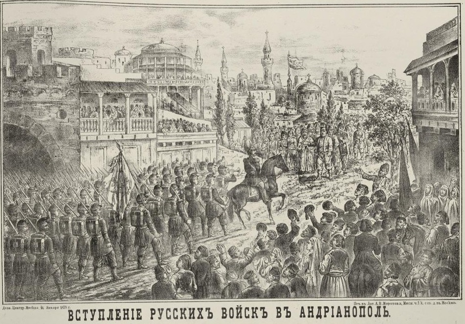 Вступление русских в Адрианополь 1878